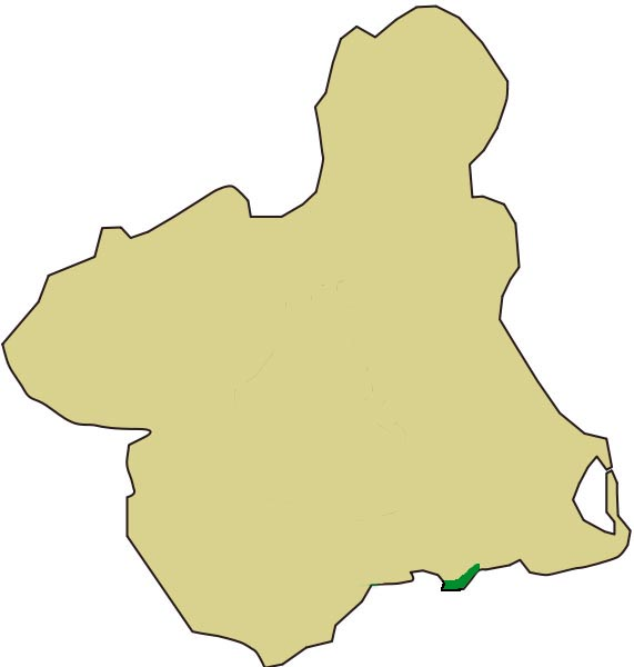 Mapa de localización del Espacio Protegido Sierra de la Fausilla en Cartagena